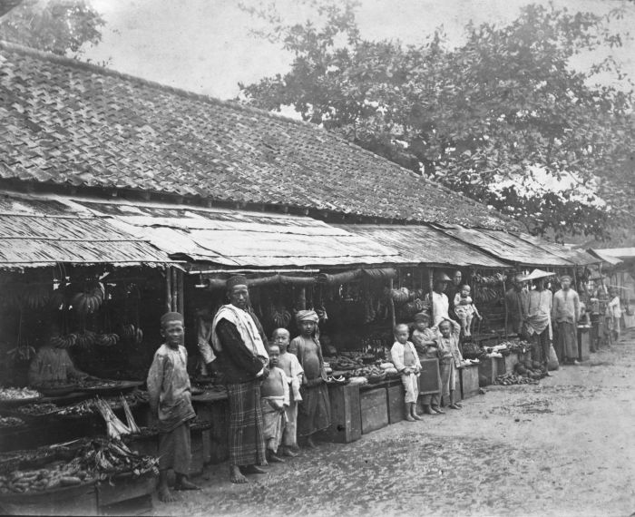 Foto. Chinese markt in Batavia